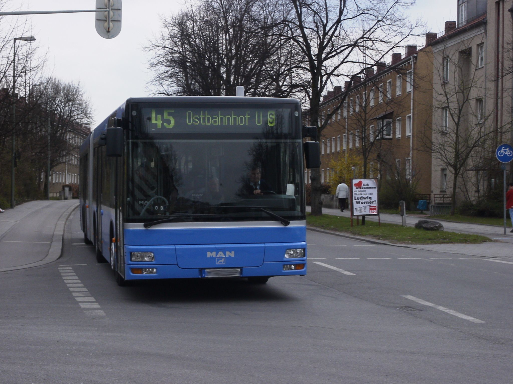 Originally uploaded in german wikipedia by user:Philipseeger MAN-Gelenkbus (MAN NG 263 von Watzinger) in München (Deutschland), selbst fotografiert; Lizenz: Public Domain.